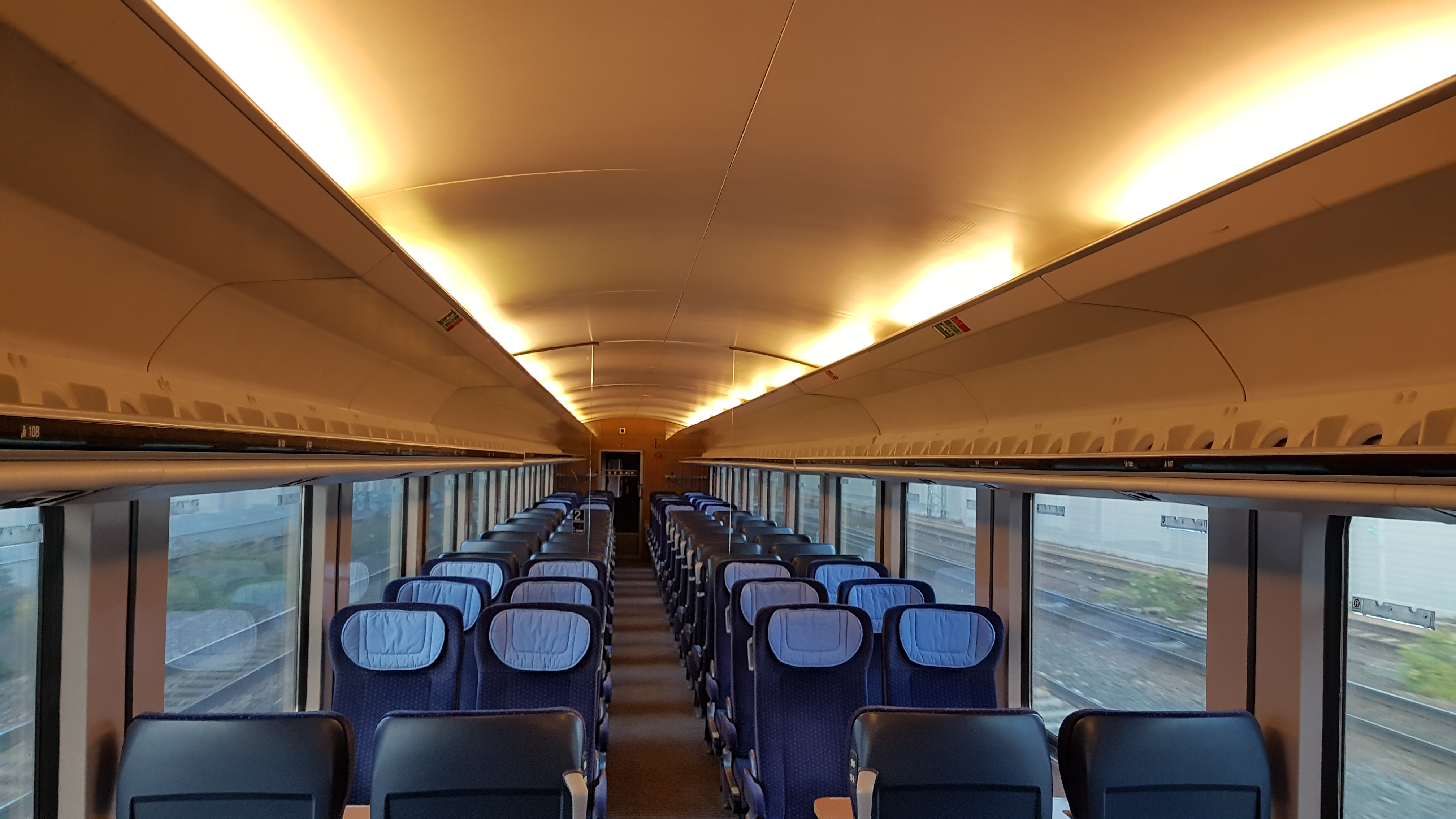 Innenraum eines Bpmmz nach der IC-Mod Modernisierung. Die Wagengattung wurde aufgrund der Modernisierung von Bpmz zu Bpmmz geändert.